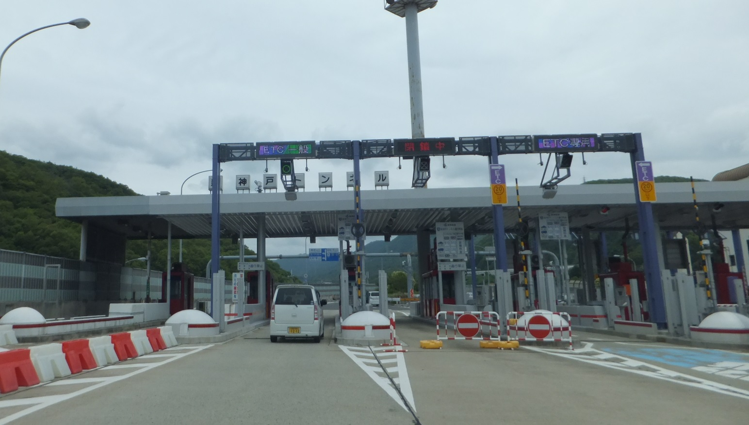 新神戸トンネル箕谷料金所